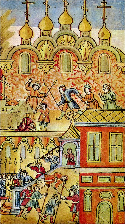 Стрелецкий бунт 15 мая 1682 года. Миниатюра из «Повести о зачатии и рождении Петра Великого». Вторая четверть XVIII века.